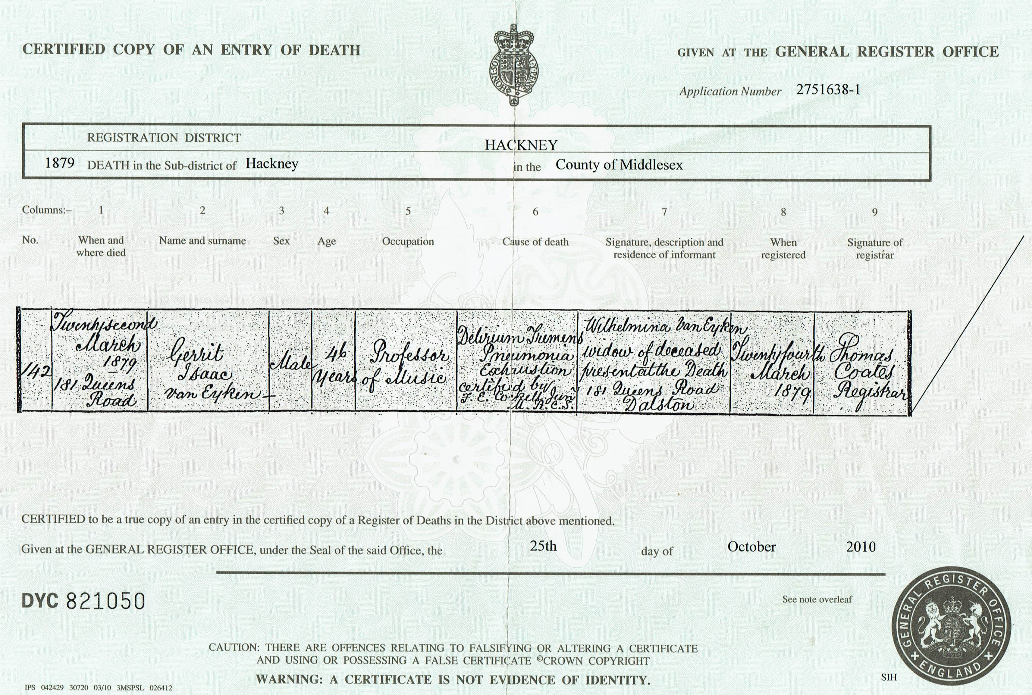 overlijdens akte